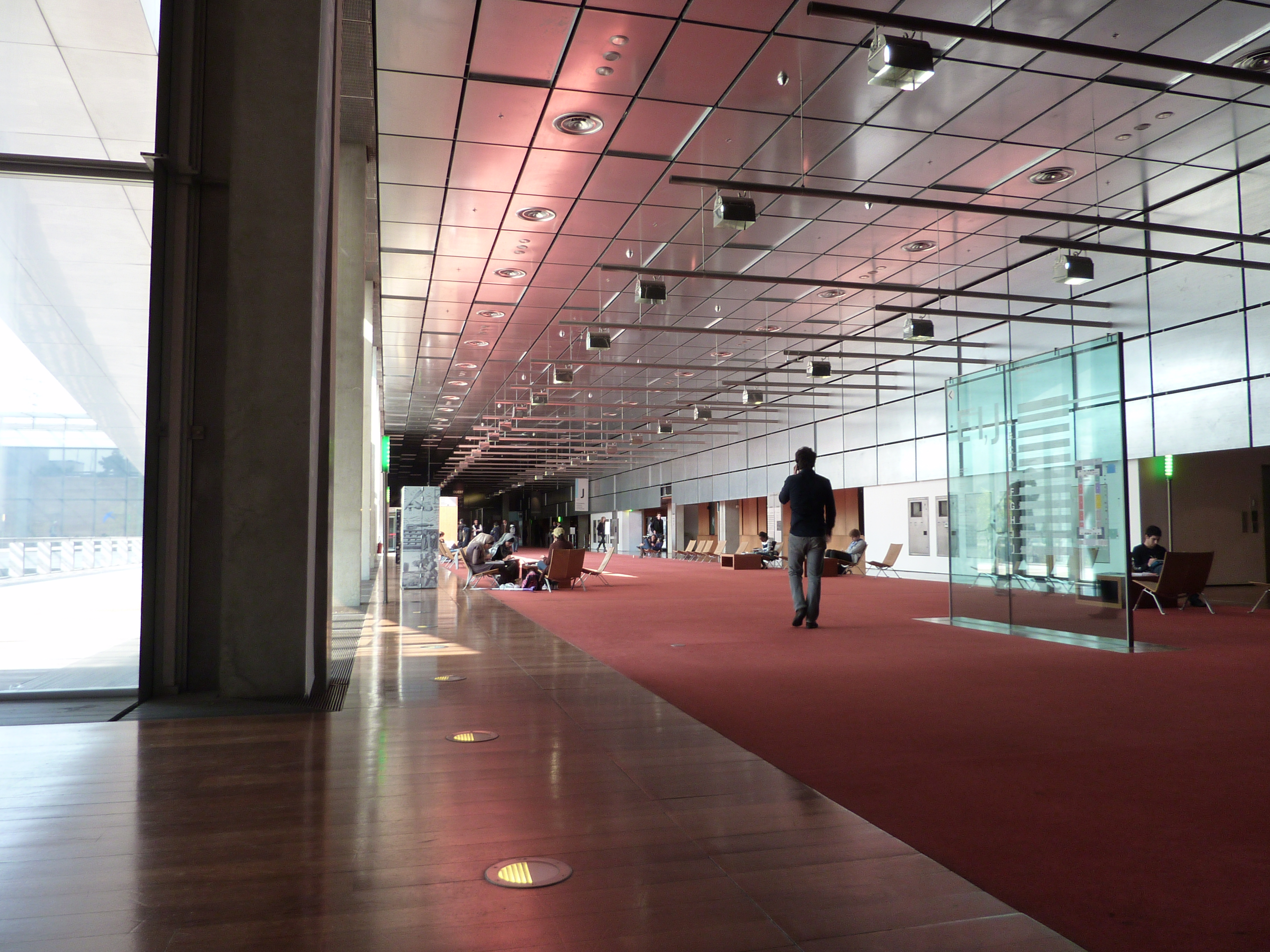 Bibliothèque Nationale de FRANCE, Site François MITTERRAND, Hall Est